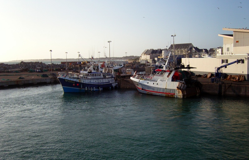 Port de La Turballe